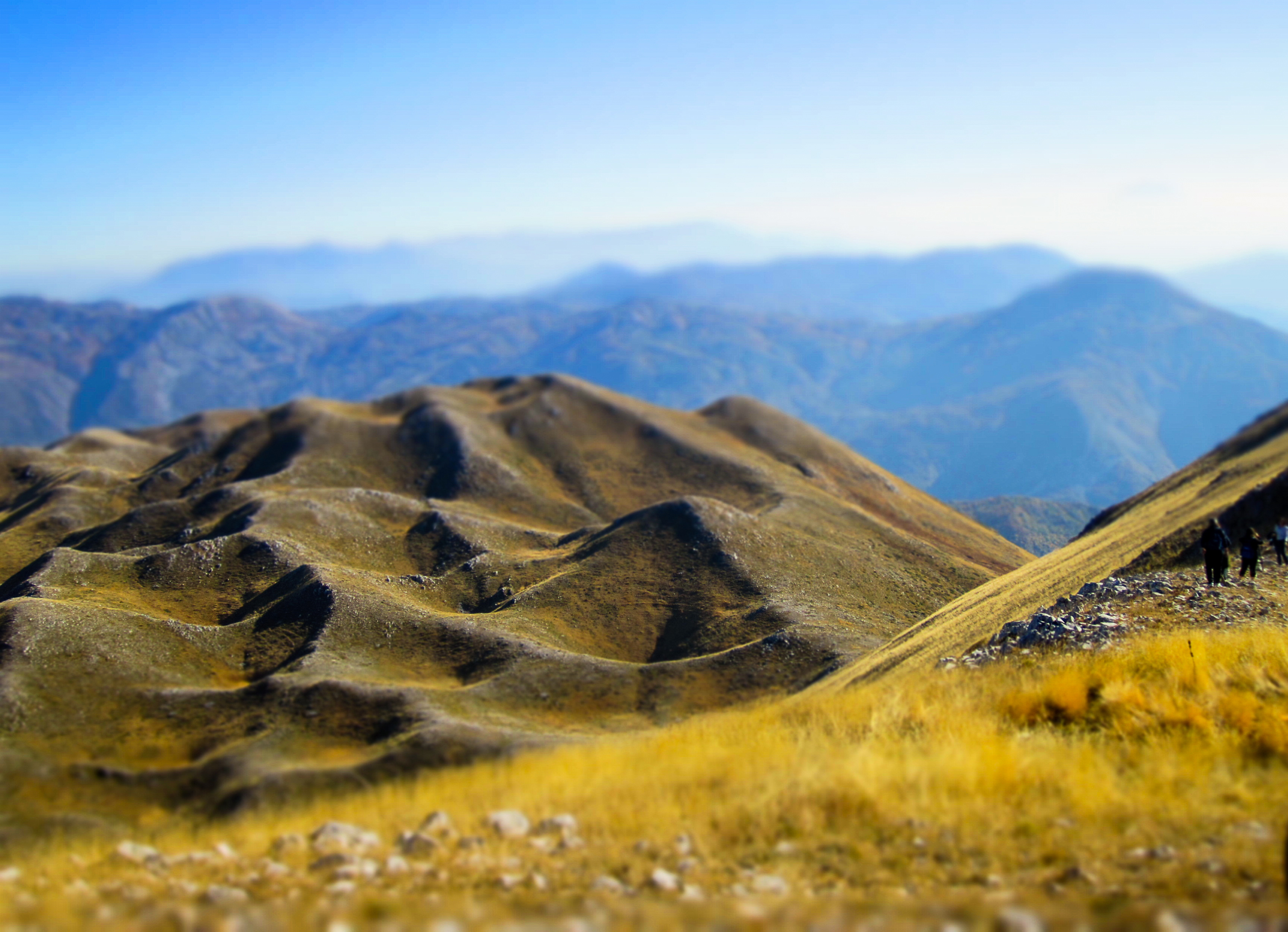 M. Gropa-Bize-Martanesh, Tirane, Mat, Buiqize